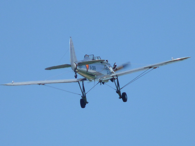 Ryan PT-22 (F-AZZY)